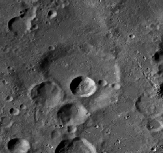 Cráter lunar Heinsius. (Imagen LRO)